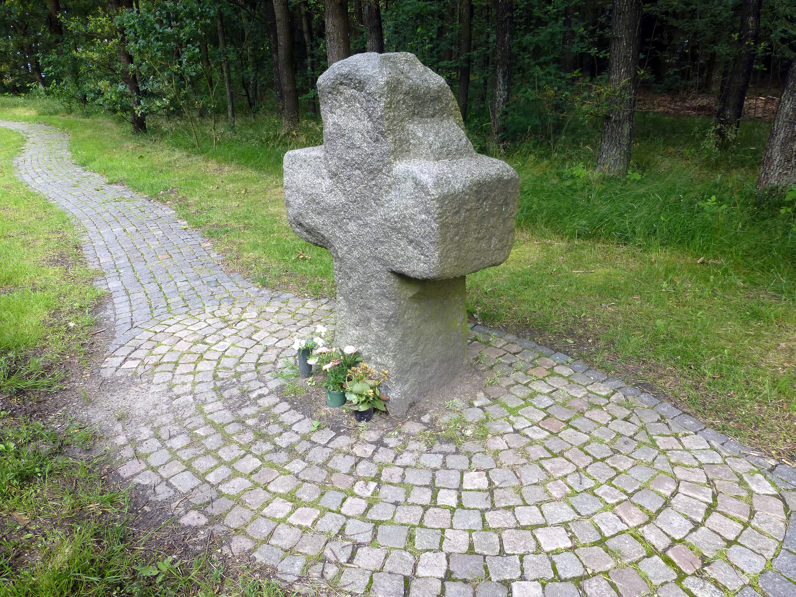 Kaj Munks Mindekors ved Hørbylunde Bakke